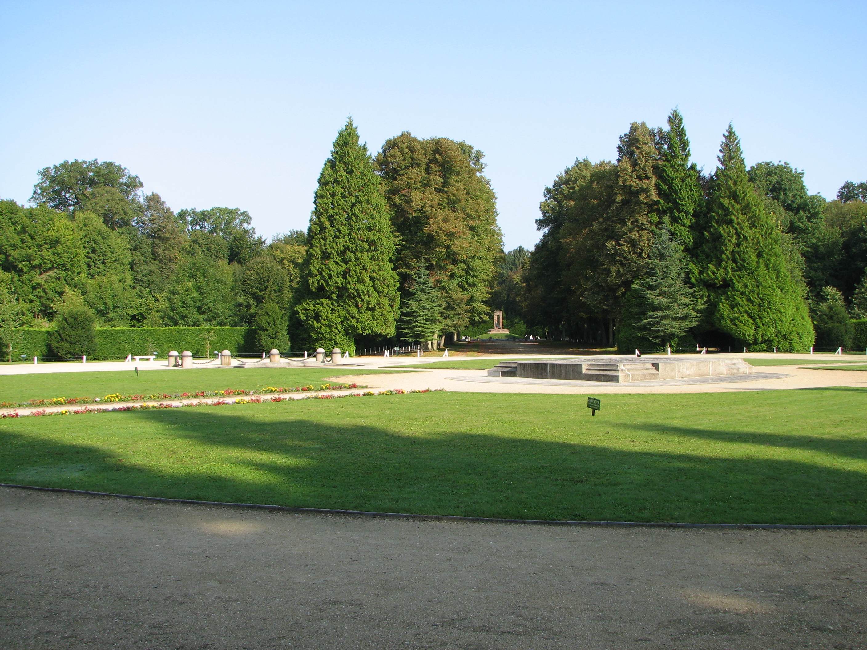 Clairière de l'Armistice (dite aussi Clairière de Rethondes) dans la forêt de Compiègne (Oise). Au milieu la dalle monumentale, à gauche l'emplacement où se trouvait le wagon-salon du maréchal Foch, ou furent signés les deux armistices. Au fond, l'allée qui mène à la route et au monument des Alsaciens-Lorrains.